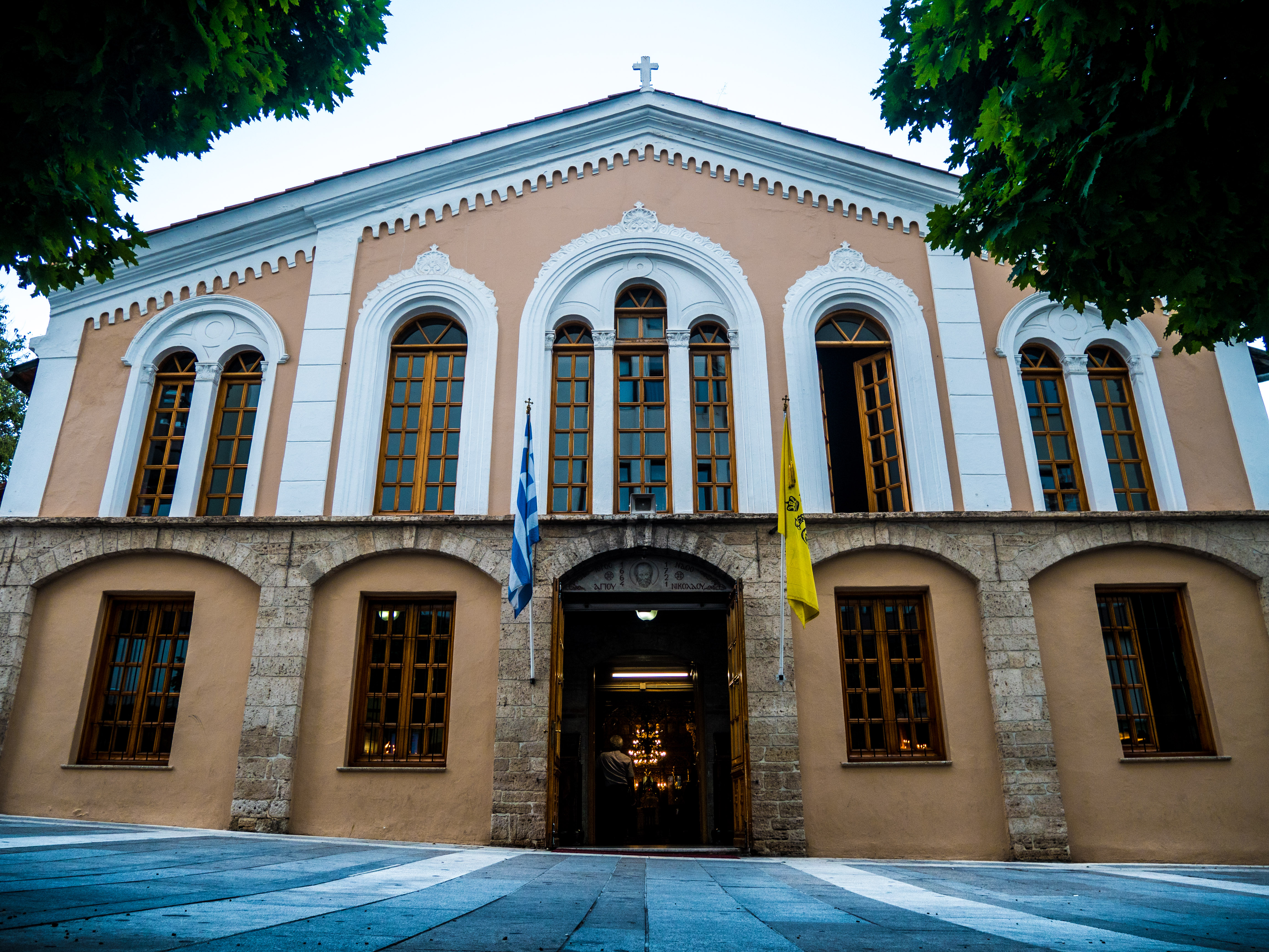 Ναός Αγίου Νικολάου Κοζάνης«Ναός Αγίου Νικολάου Κοζάνης»